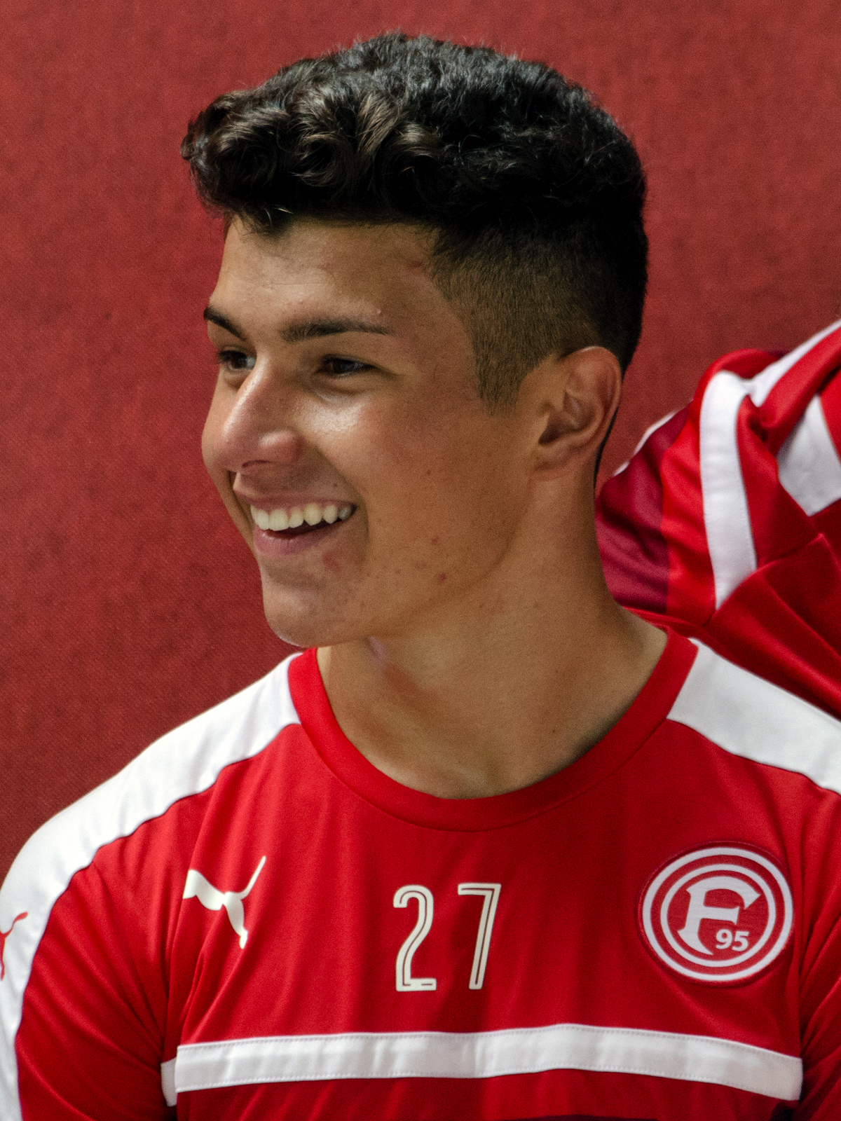 Taylan Duman, deutsch-türkischer Fußballspieler